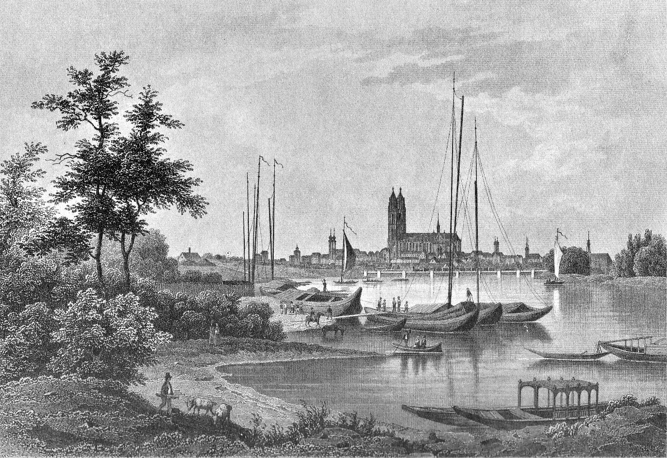 Historische Ansicht von Magdeburg in Sachsen-Anhalt. Stahlstich.